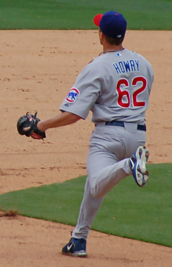 Bob Howry